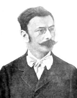 Daniel Popovici Barcianu